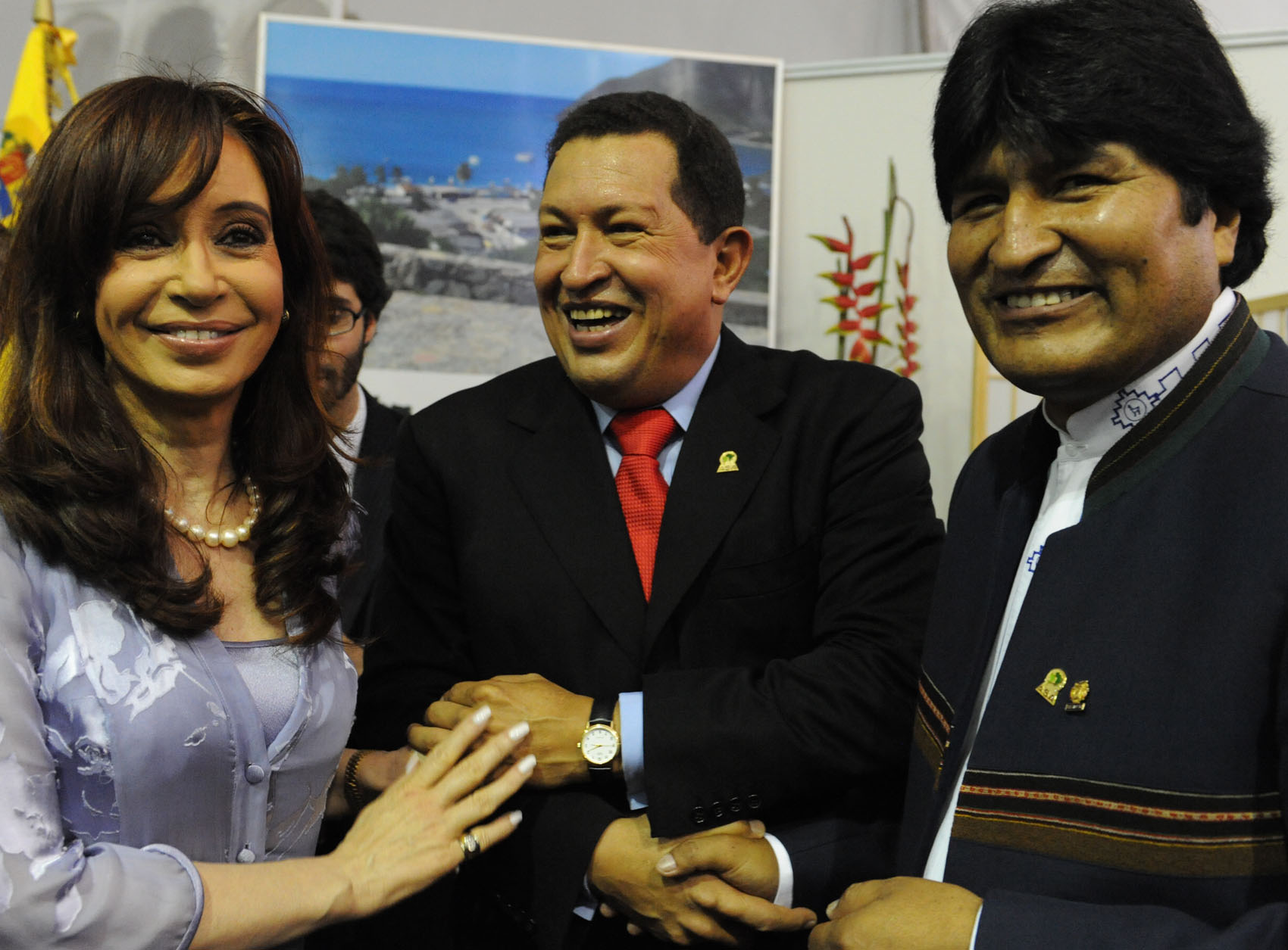 Cristina Fernández junto a sus pares de Bolivia, Evo Morales, y Venezuela, Hugo Chávez